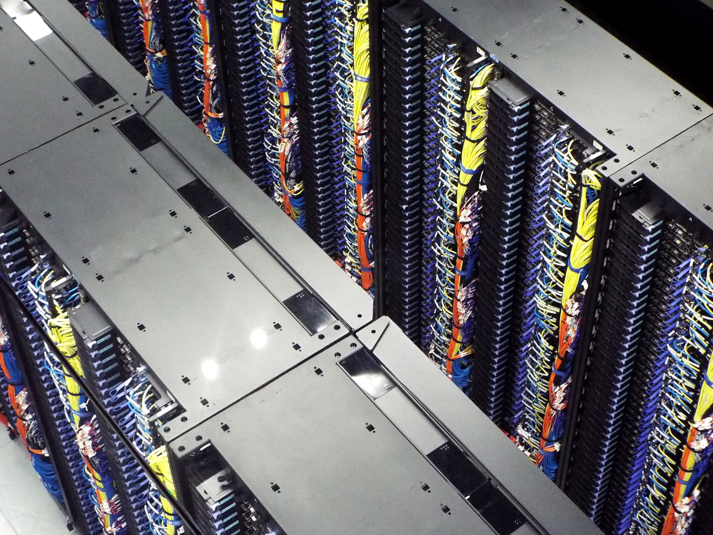 Vista cenital del supercomputador MareNostrum III, situado en la antigua capilla junto a la Torre Girona, en el Barcelona Supercomputing Center-Centro Nacional de Supercomputación, España.